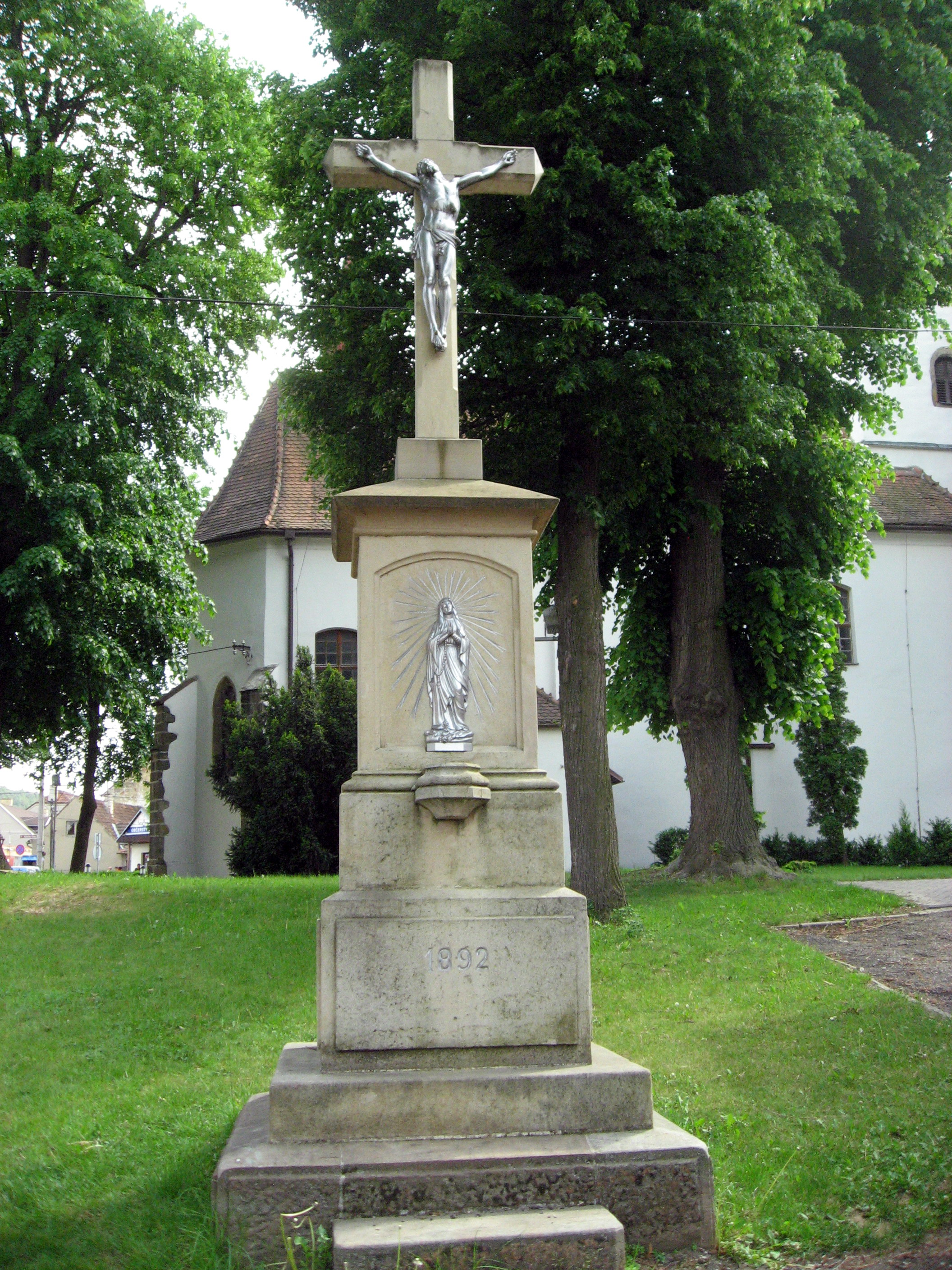 Drásov, kříž